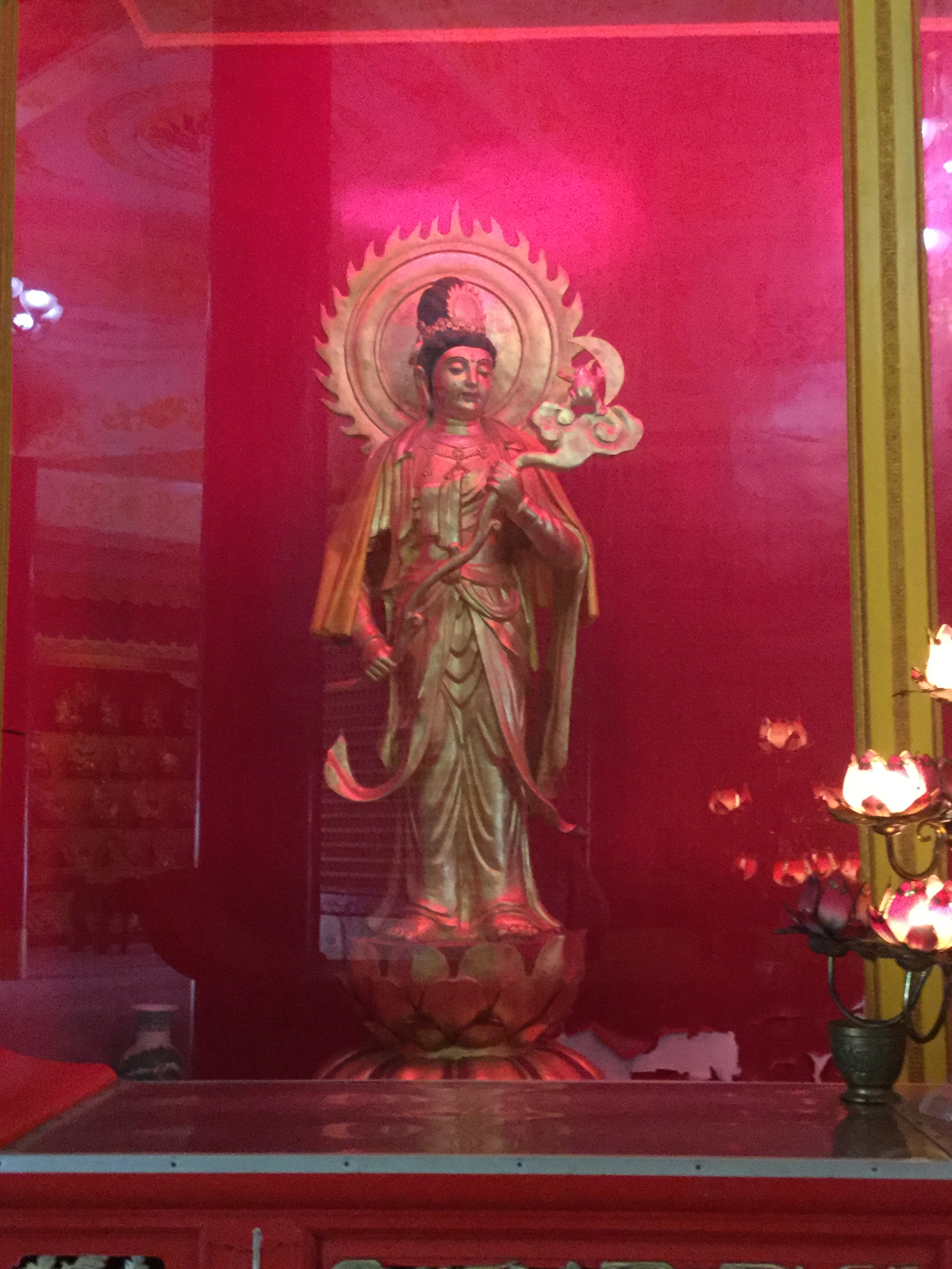 月光菩萨，汕头天坛花园